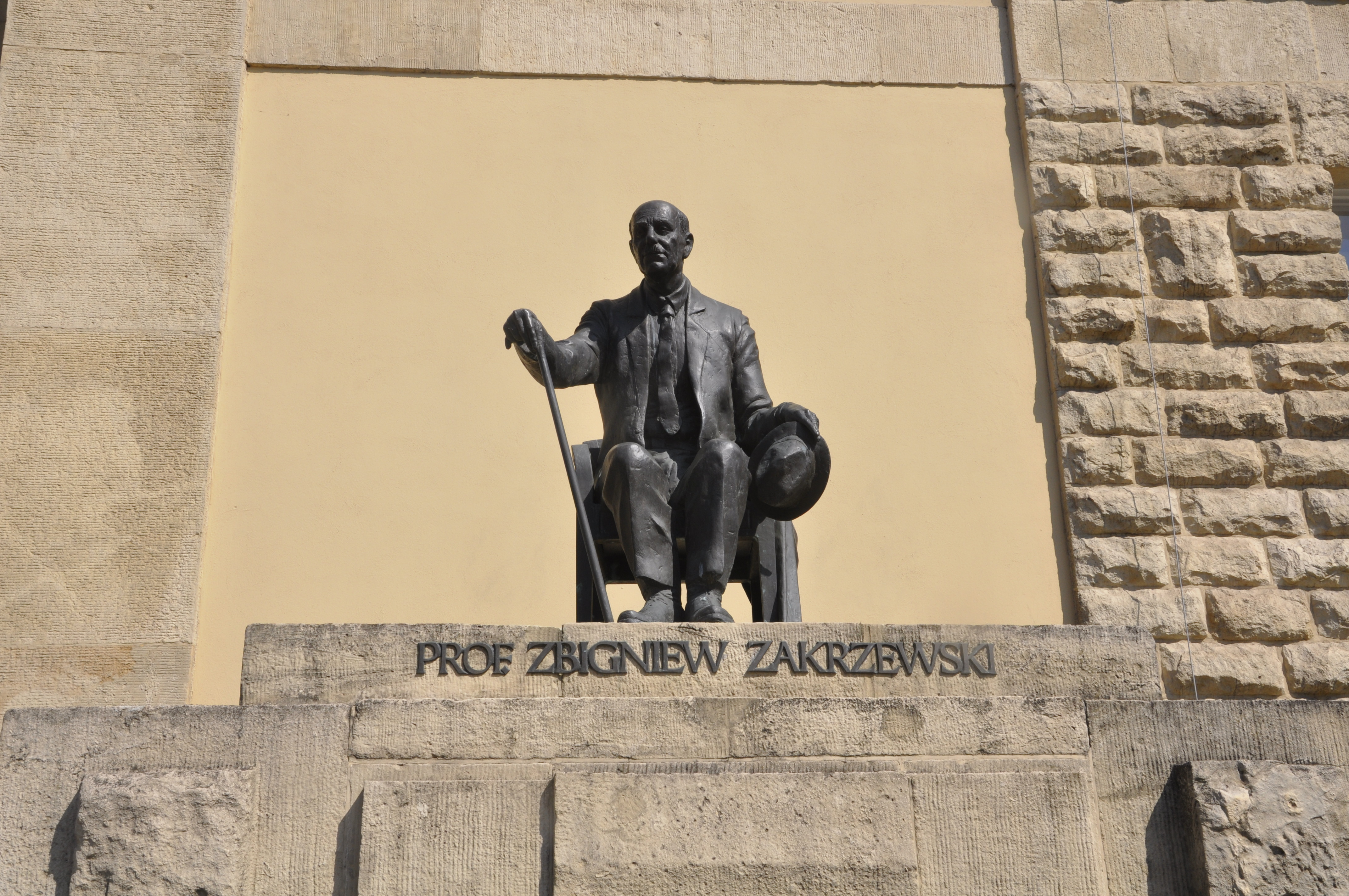 Pomnik Zbigniewa Zakrzewskiego przed budynkiem Akademii Ekonomicznej (1928-1931) w Poznaniu